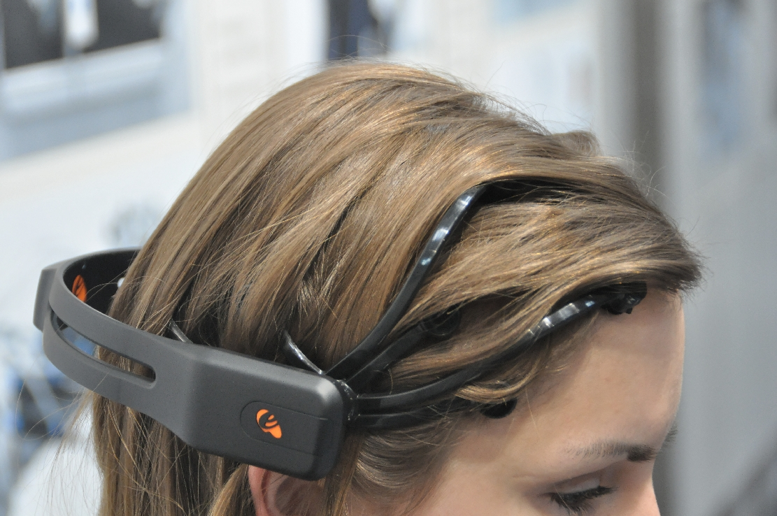 Hannover-Messe April 2012 Dieses Foto entstand durch die Mithilfe des gemeinnützigen Vereins Skillshare bei der Akkreditierung als Fotograf. Infos unter skillshare.eu Skillshare e.V. ist ein eingetragener gemeinnütziger Verein zur Förderung der Bildung durch Unterstützung der Erstellung, Sammlung und Verbreitung so genannten freien Wissens. IBAN: DE16 8306 5408 0004 8850 66 BIC: GENODEF1SLR Bank: VR-Bank Altenburger Land